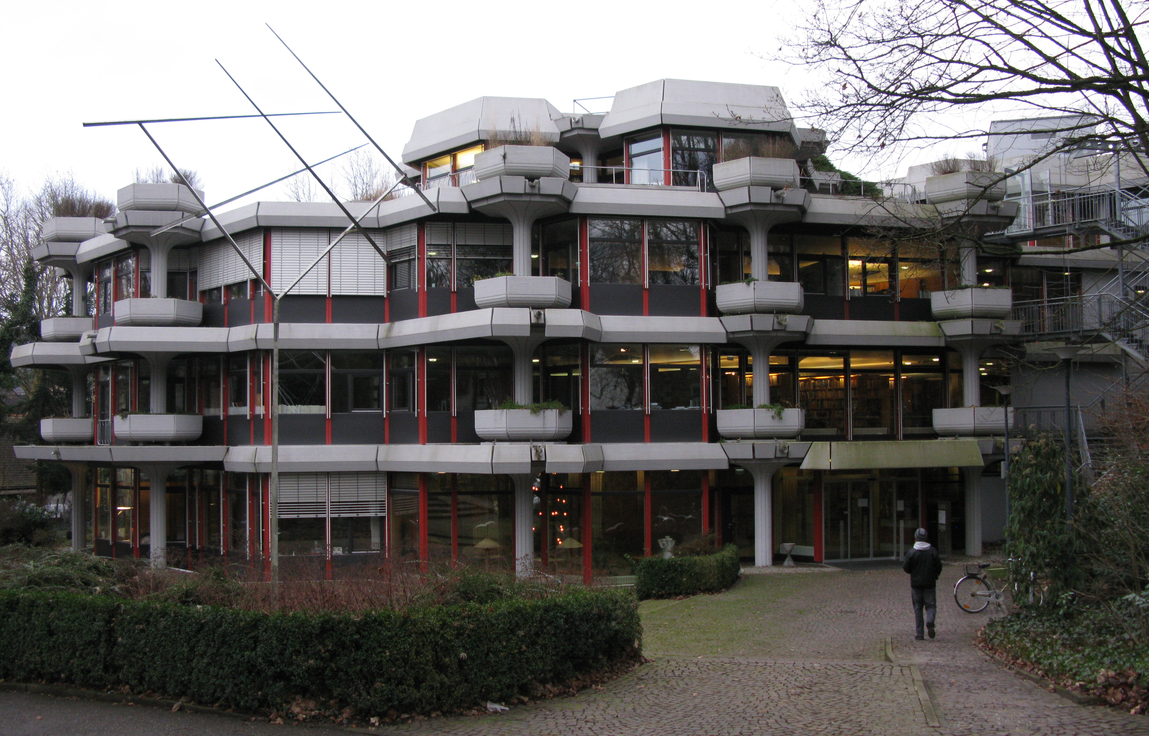 Max-Planck-Institut für ausländisches und internationales Strafrecht in Freiburg, Bau von 1978 des Architekten Herbert Dörr mit einer Skulptur von George Rickey